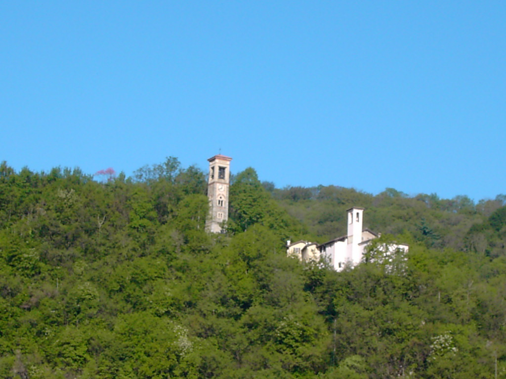 Campanile de Barbengo